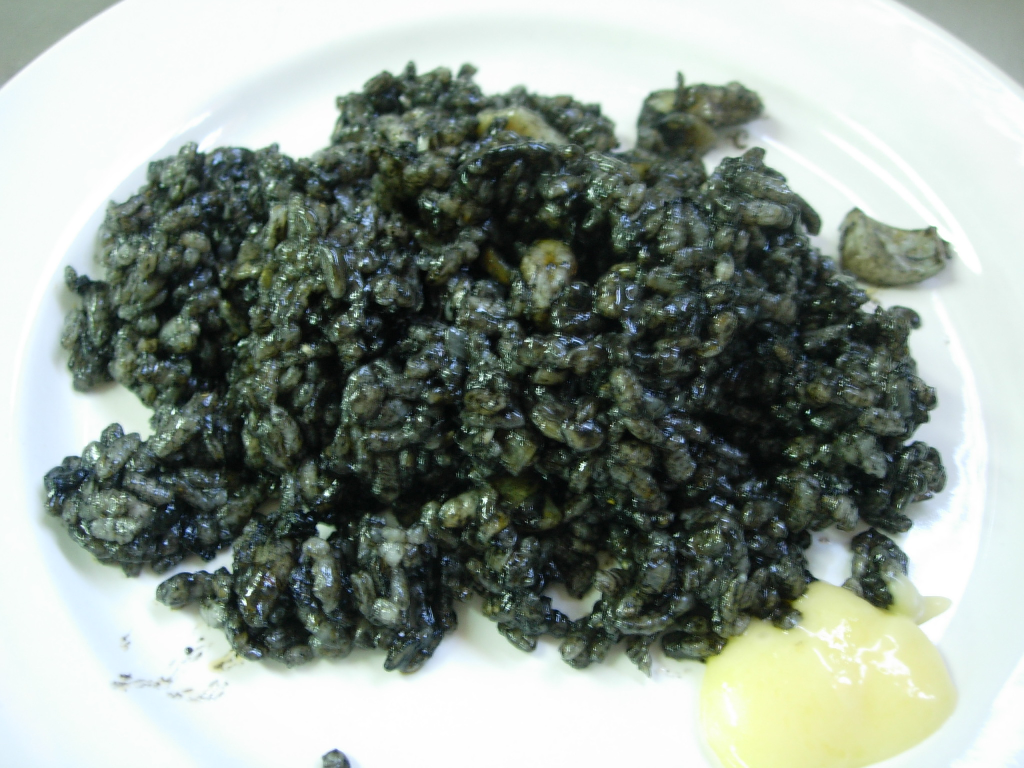 Arroz negro